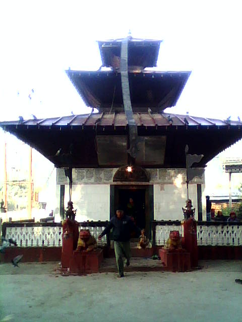 नेपाली: l;b